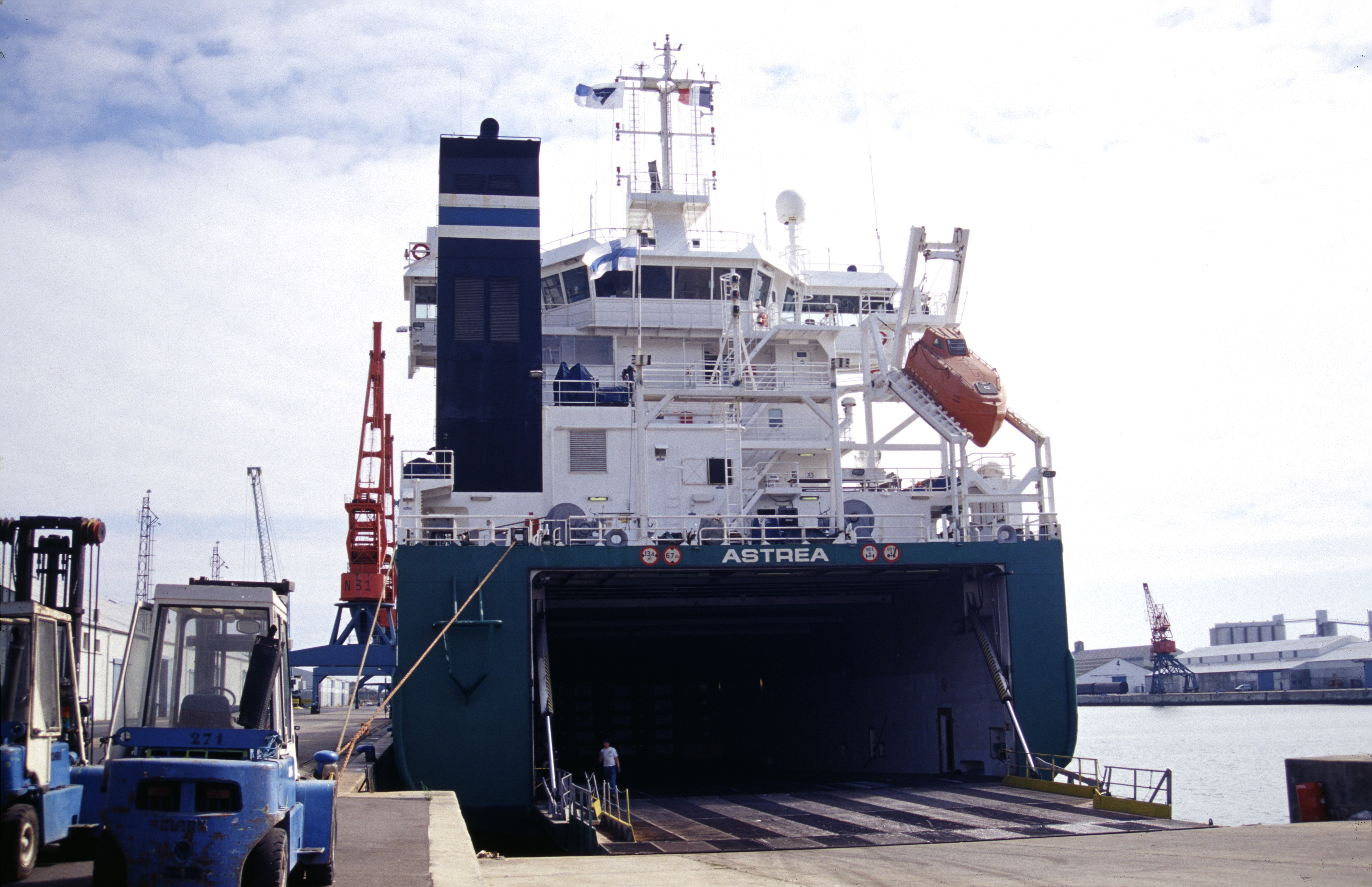 L' arrière avec la rampe baissée du navire cargo roulier M/V Astrea. Port de commerce de La Rochelle-Pallice. La Rochelle, France.